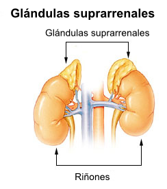 Glándulas suprarenales